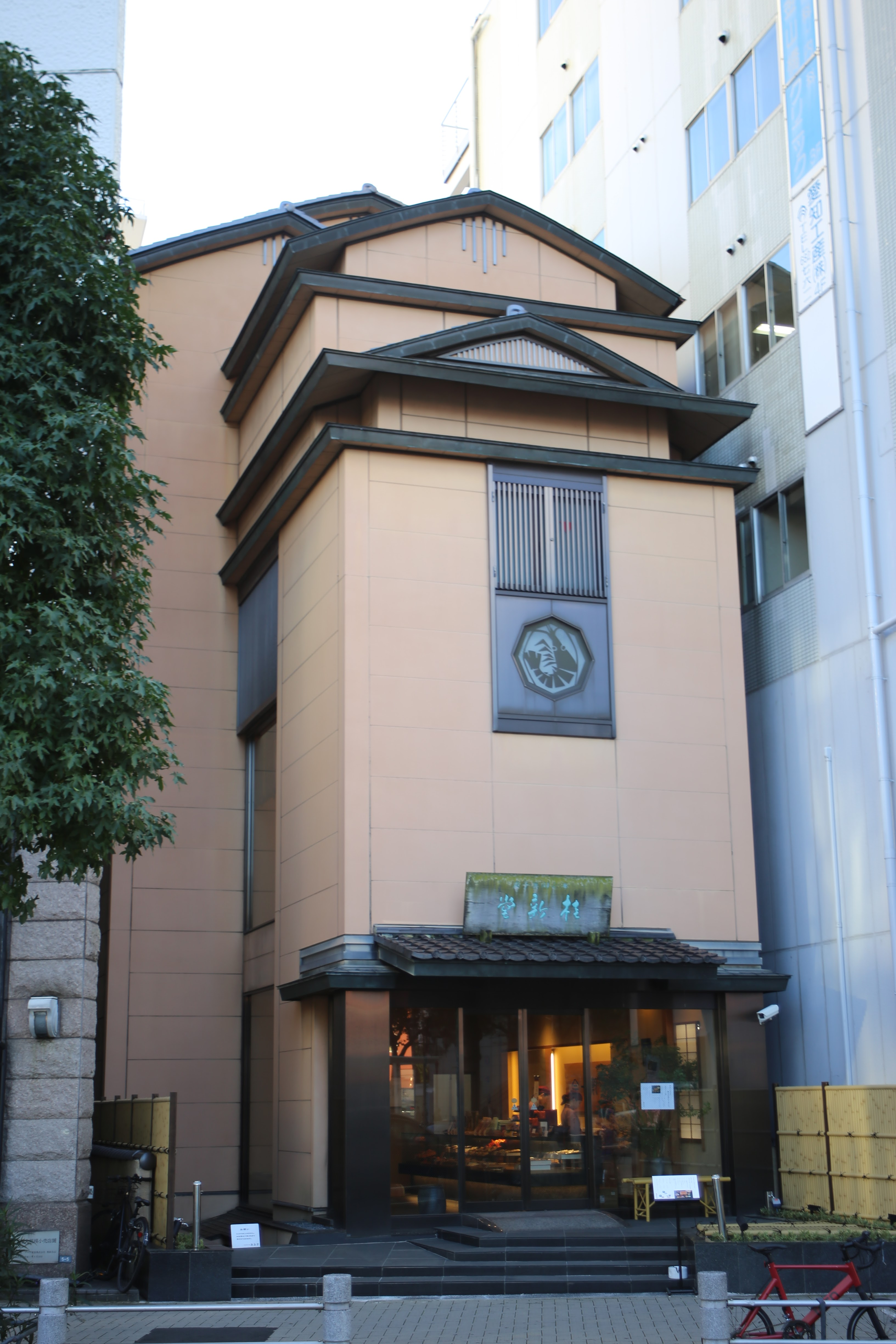 名古屋市熱田区金山町一丁目 桂新堂